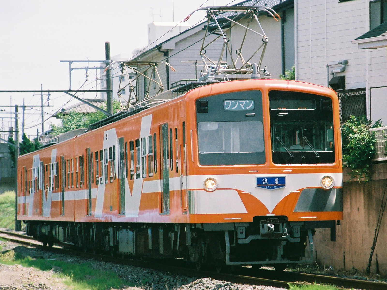 English - Ryutetsu 5000 series, Kumoha5002-Kumoha5102 ("Ryusei" 3rd.). At Ryūtetsu Nagareyama Line Hiregasaki Stn. - Heiwadai Stn. Japanese - 流鉄5000系・クモハ5002-クモハ5102（3代目「流星」）。流鉄流山線、鰭ヶ崎 - 平和台間。